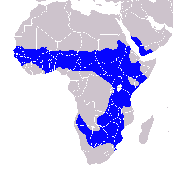 Tockus nasutus - Distribution